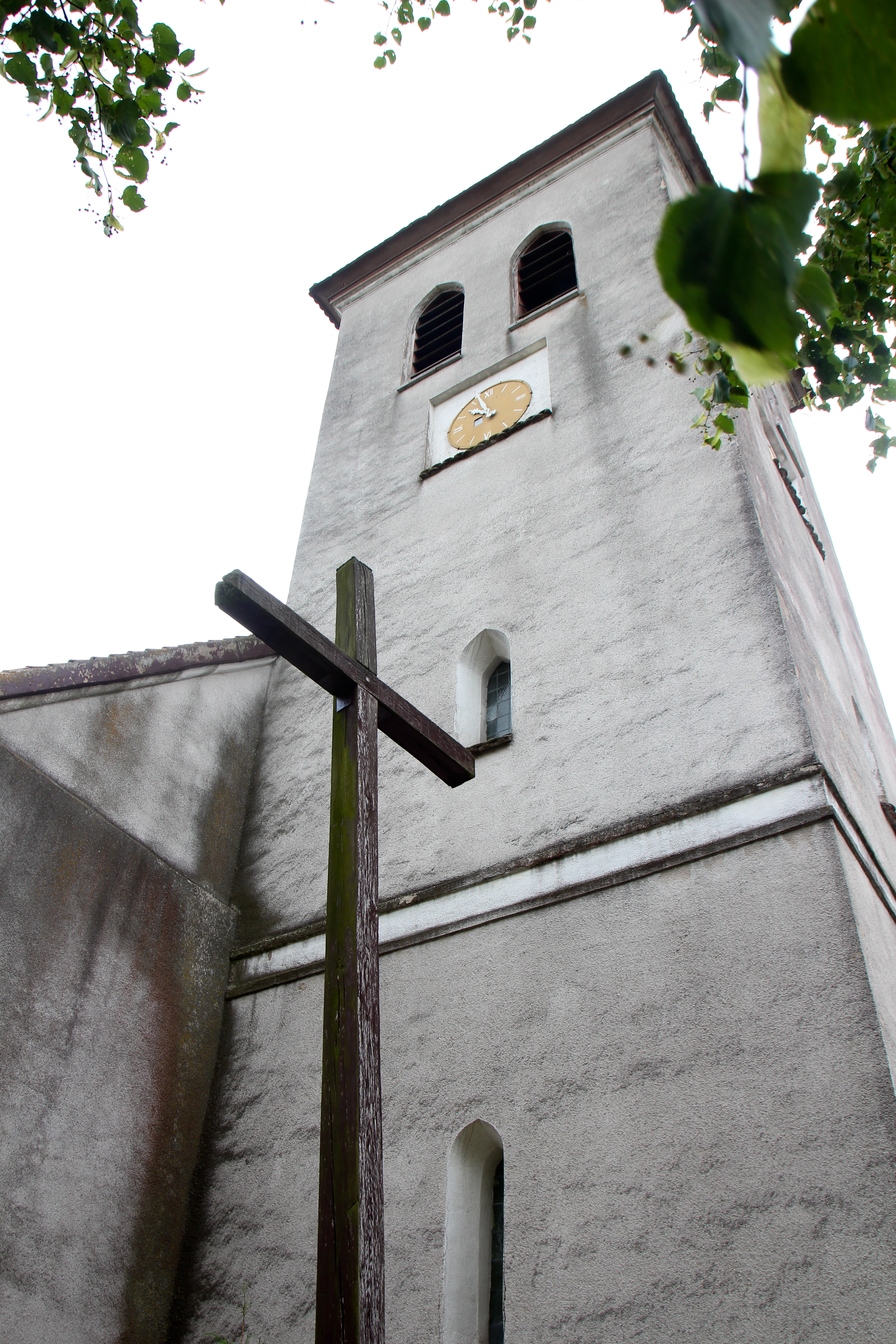 Momajny - rzymskokatolicki kościół parafialny p.w. św. Piotra Apostoła, 4 ćw. XIV, 1818-1820